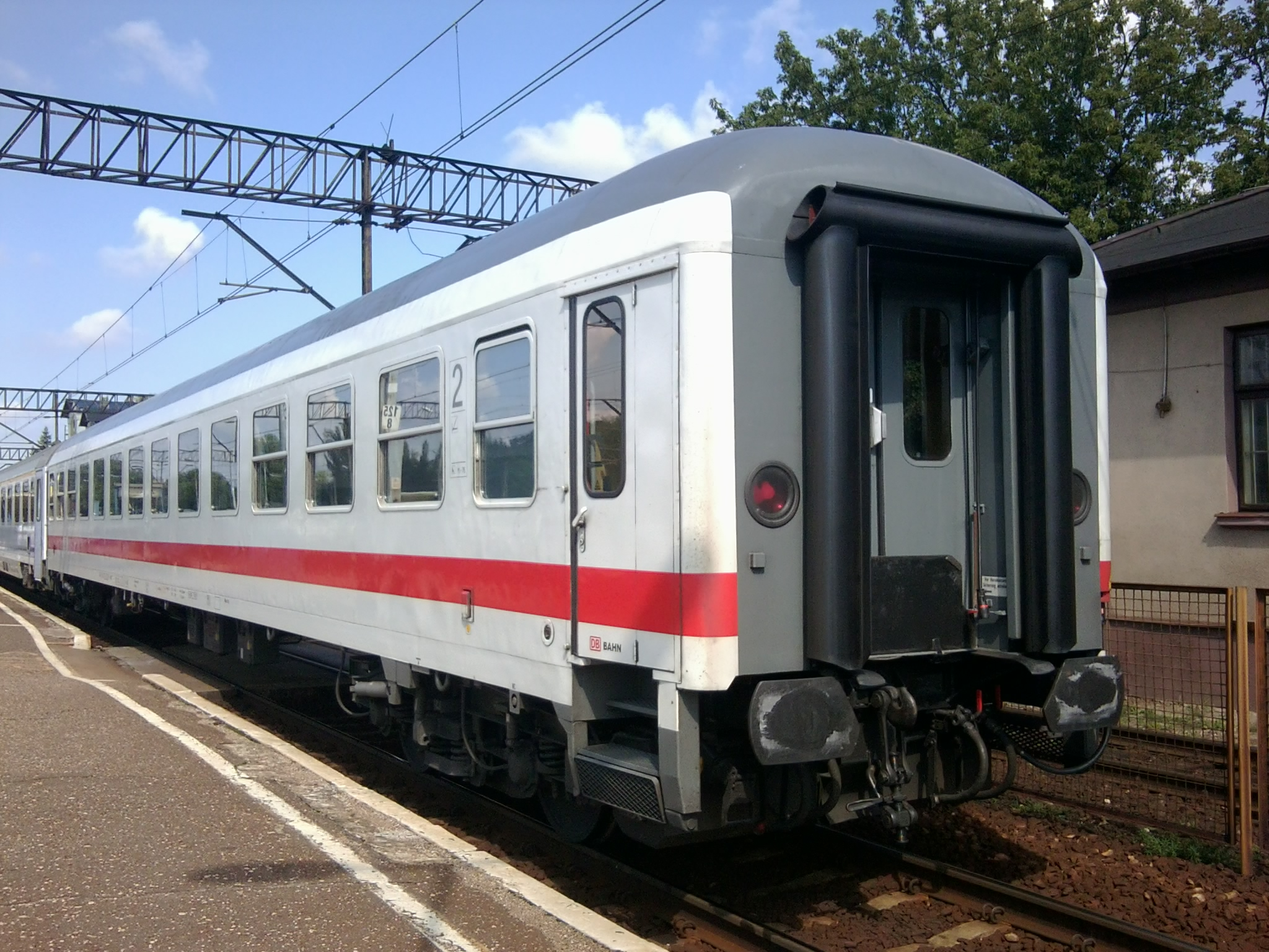 Wagon pasażerski 2 klasy przewoźnika Deutsche Bahn w składzie EC BWE relacji Warszawa Wschodnia - Berlin Hbf podczas postoju na stacji Kutno.